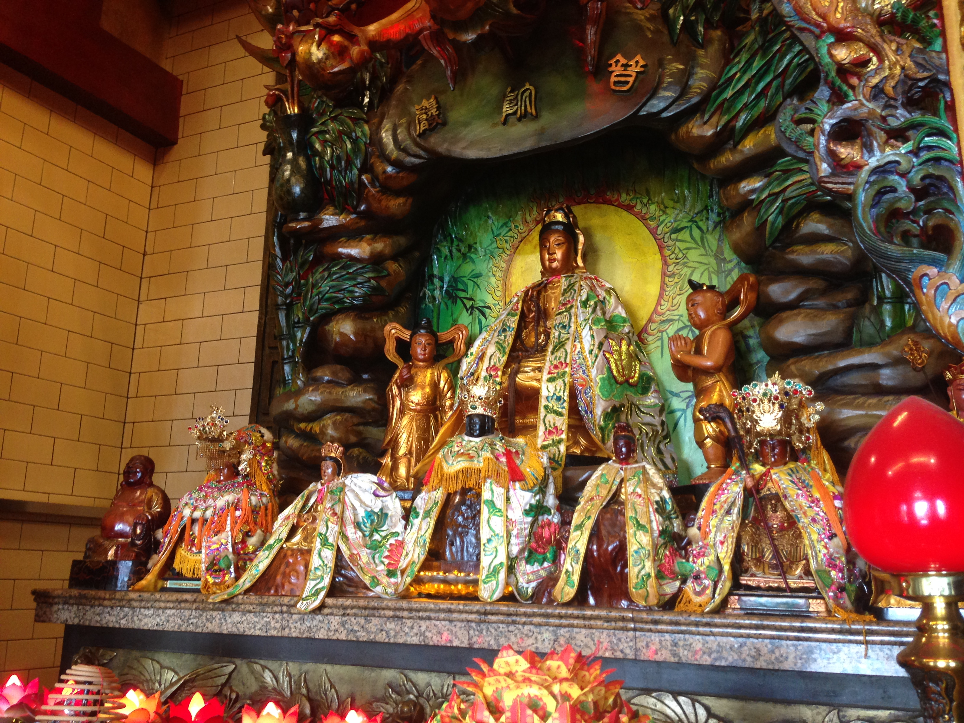 下塔悠福德宮觀音神像